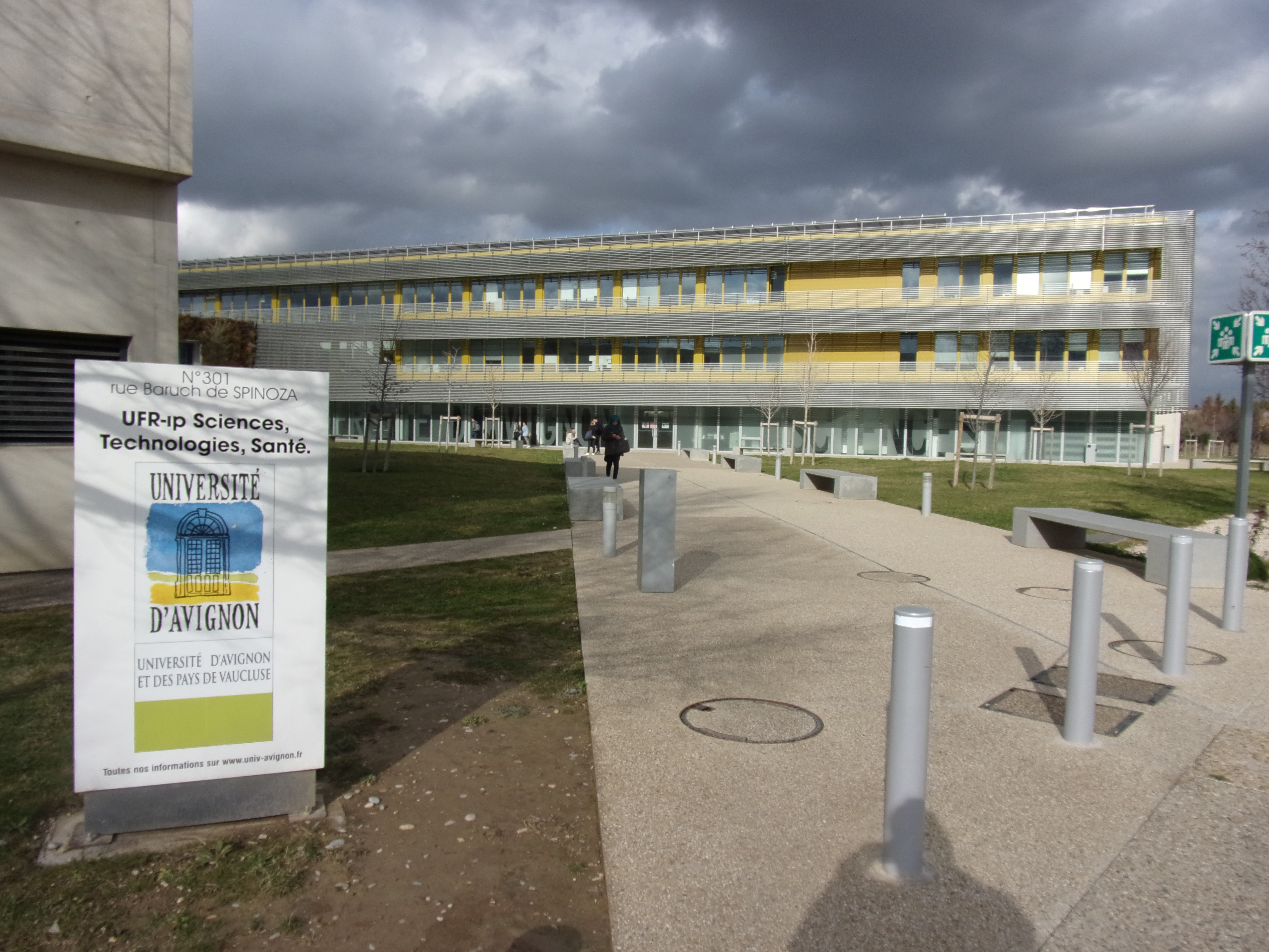 Agroscience à Agroparc